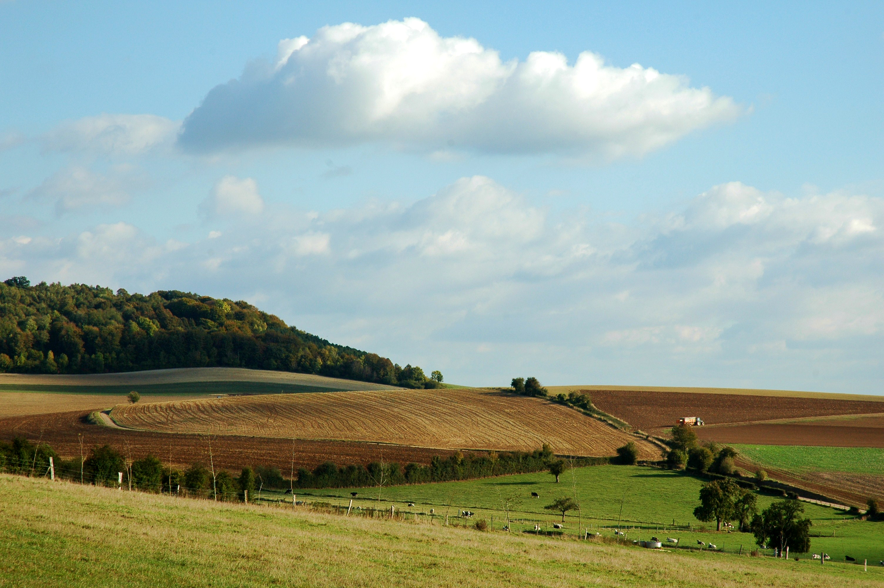 Paysage des environs de Neufchâtel-en-Bray (Seine-Maritime, France). .